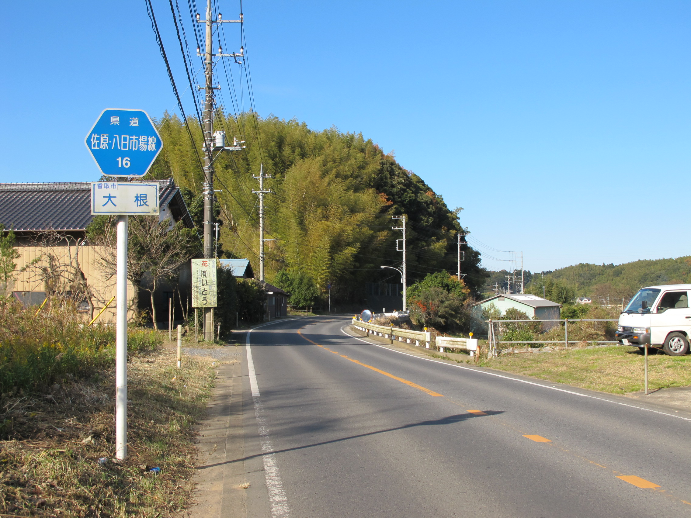 千葉県道16号佐原八日市場線（香取市大根）